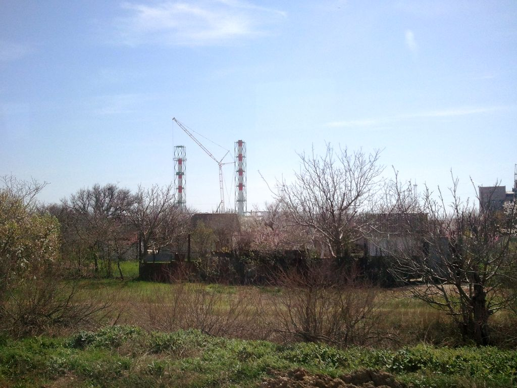 Строящаяся Сакская ТЭЦ мощностью 120 МВт